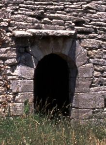 Encadrement en pierres de taille de l'entrée de la borie No 52 à Gordes (selon la nomenclature établie par l’abbé Verney). S'agissant d'un remploi provenant d'une architecture noble, le millésime 1738 incisé au-dessus des lettres RM sur la clé de l’arc, ne date que l’encadrement lui-même.